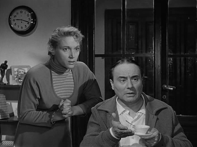 Diana Dei con Mario Riva nel film Bravissimo (1955)